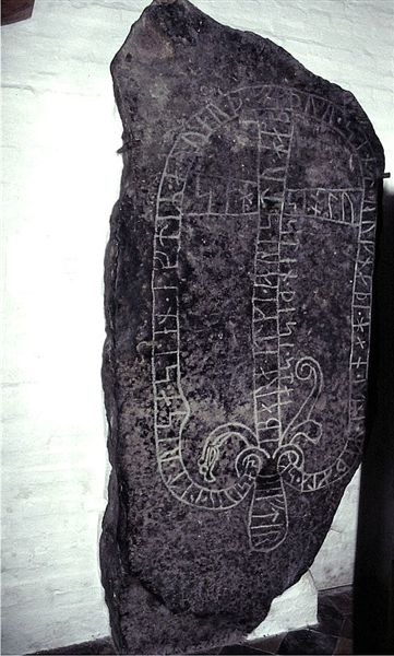 Nylars Kirke på Bornholm